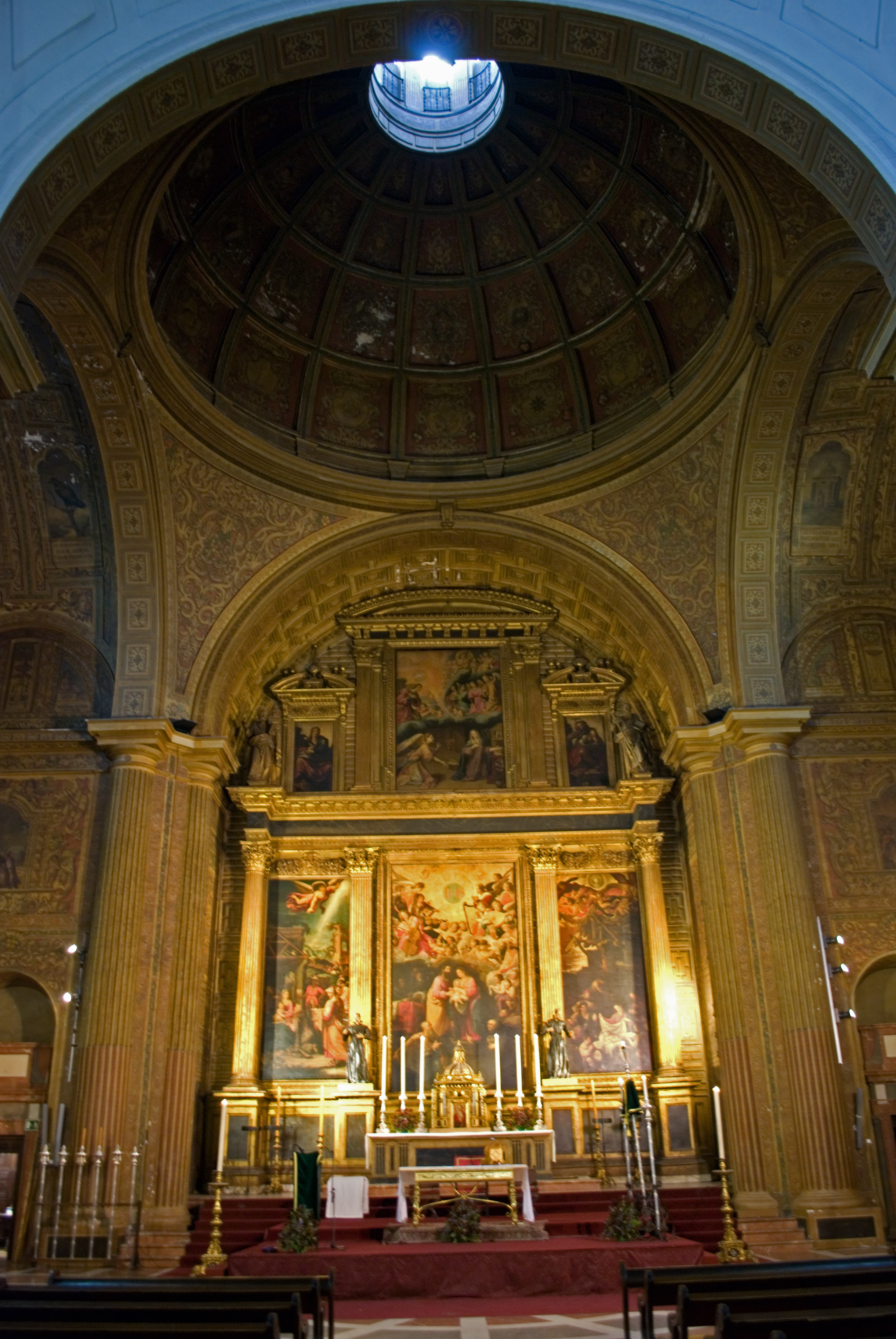 Interior de la iglesia de la Anunciación en Sevilla. Retablista: Alonso Matias, pintores: Juan de Roelas, Girolamo Lucente de Correggio y Antonio Mohedano.